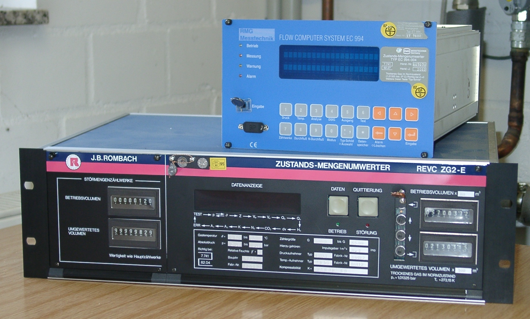 Zwei Zustands-Mengenumwerter (engl.: Volume corrector); unten: Baujahr 1990, oben: Baujahr 2002